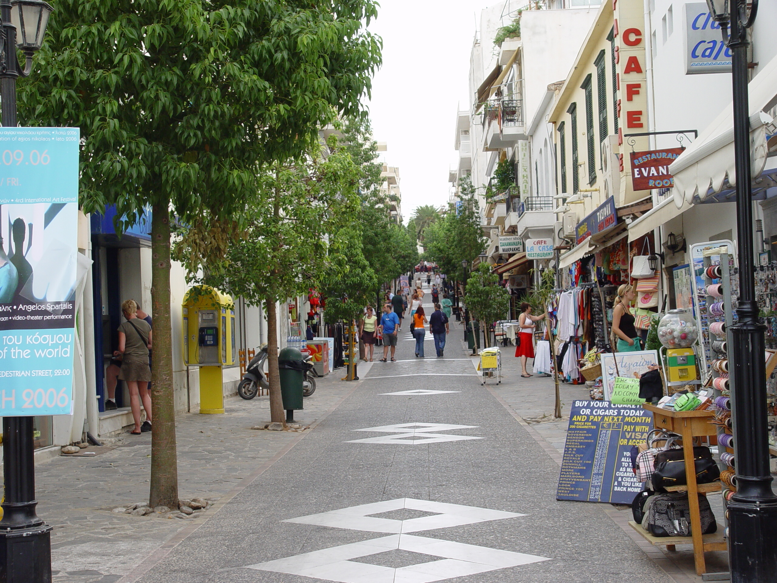 Der Fußgängerzone von Agios Nikólaos.